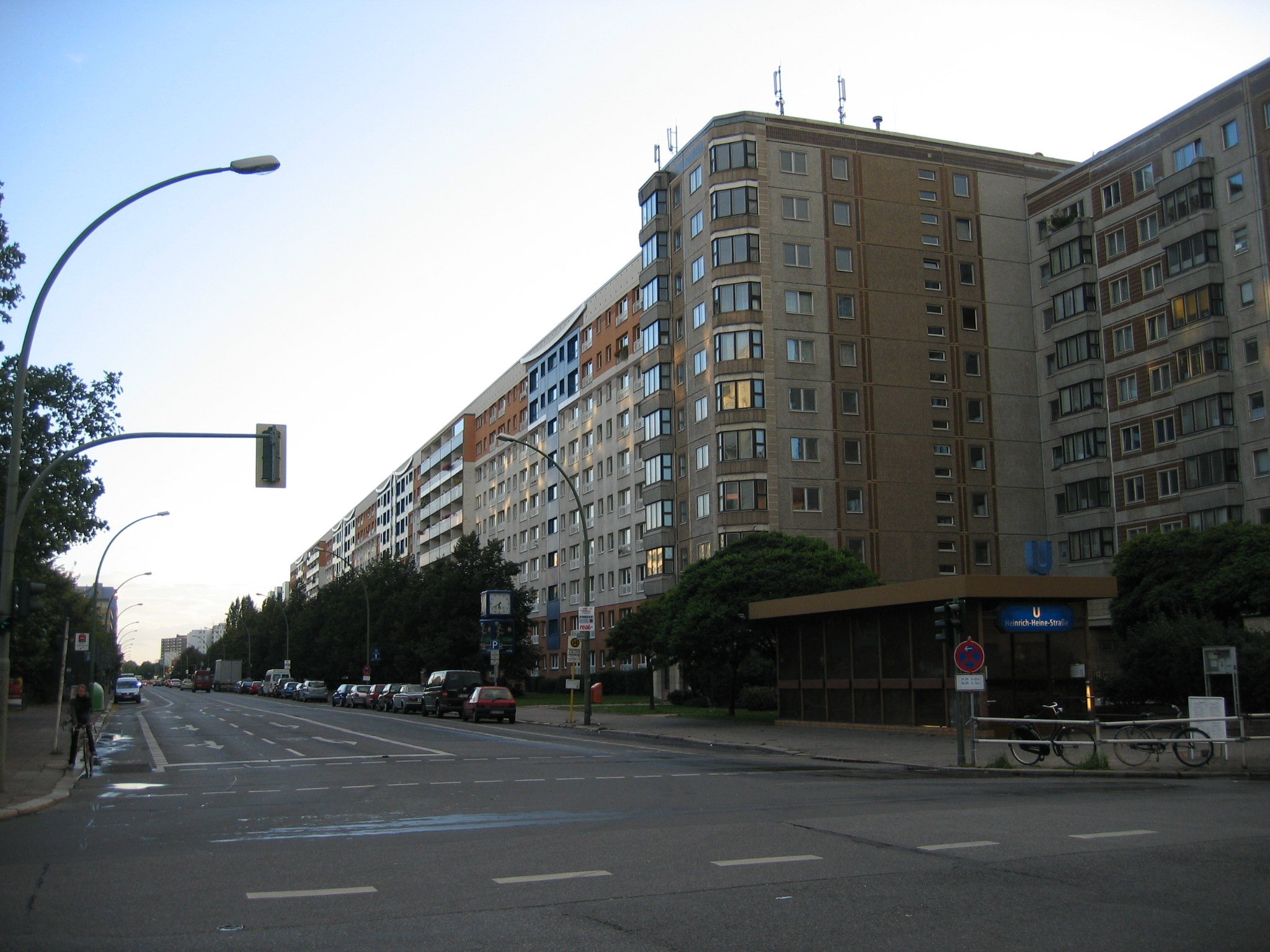 Heinrich-Heine-Straße, Berlin-Mitte